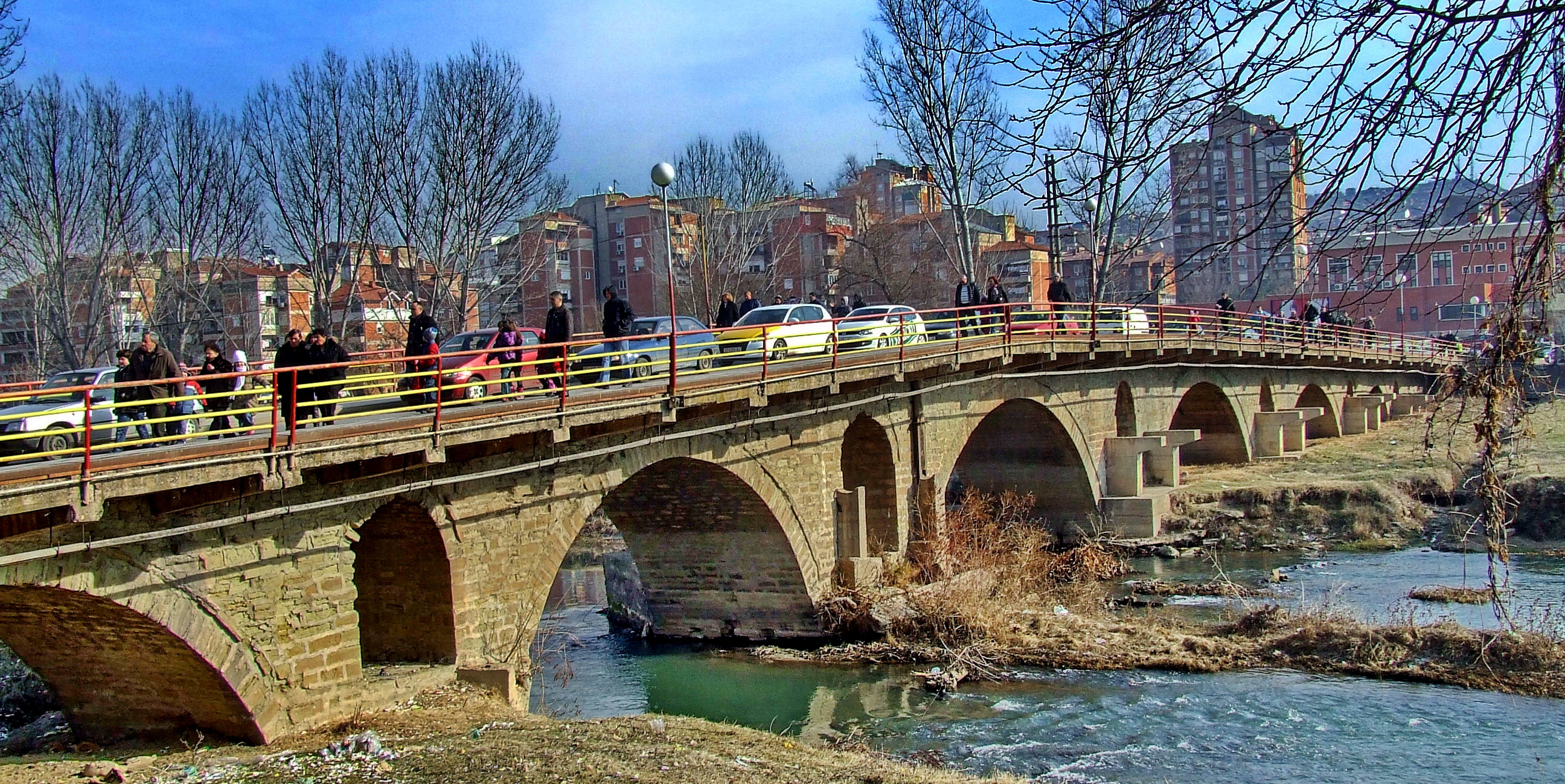 фотографија од каменит мост во населба осми ноември во Штип